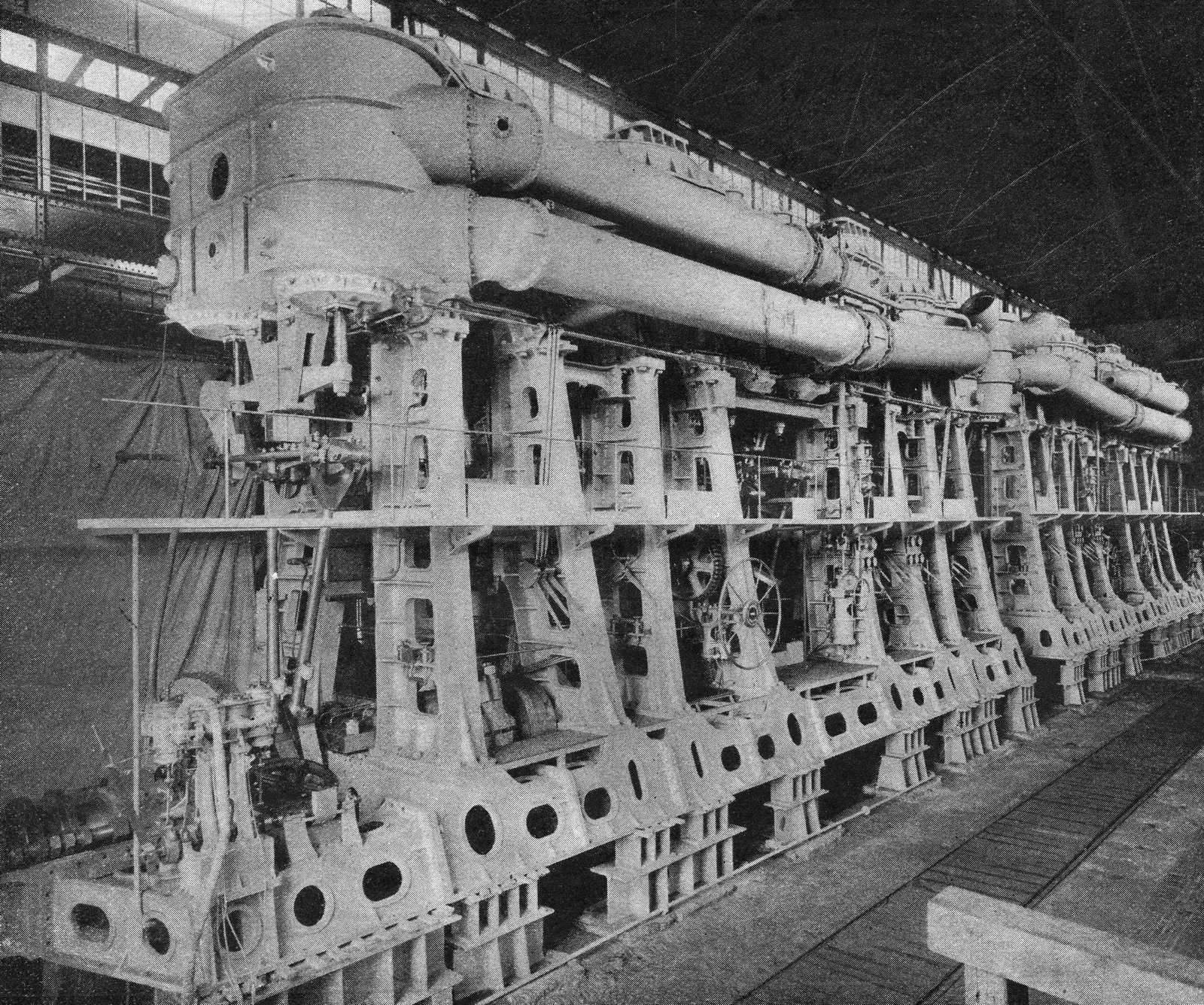 Sechszylindrige Dampfmaschine für den Schnelldampfer "Deutschland"